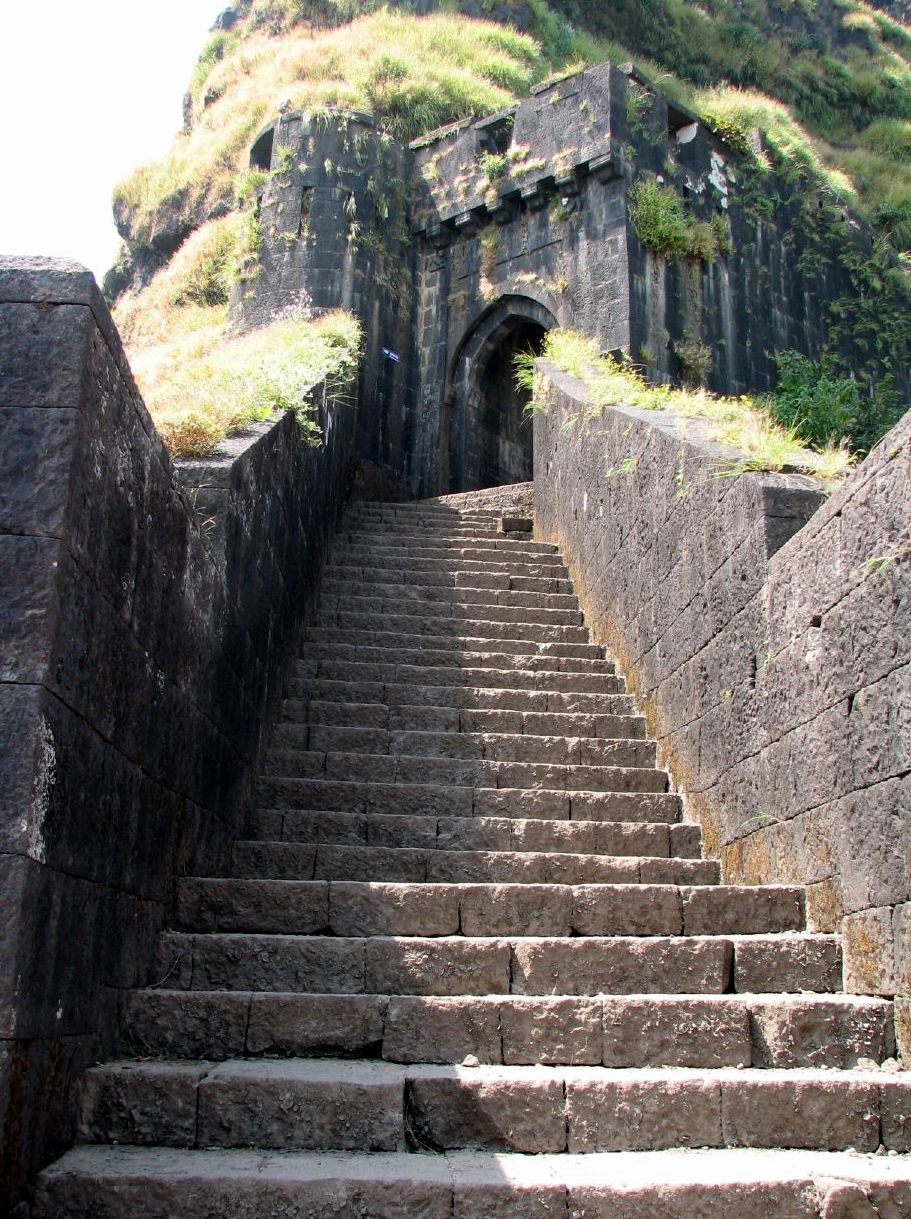 Ganesh Darwaja, Lohagad, Maharashtra, India